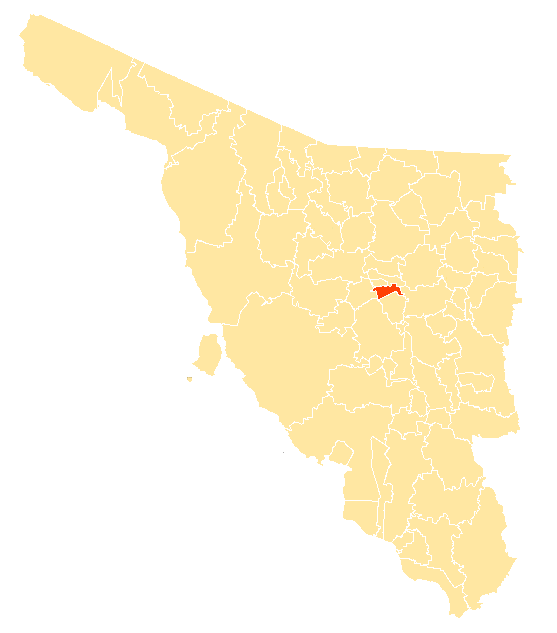 Municipio dentro de Sonora, México.